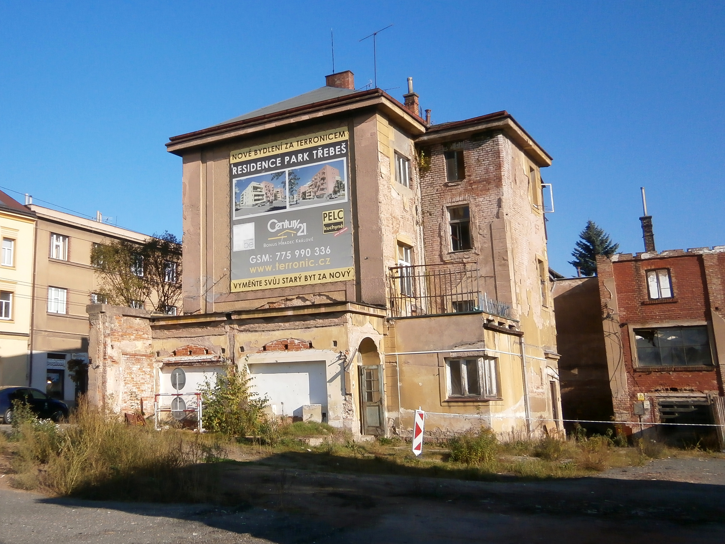 Pražská třída čp. 111